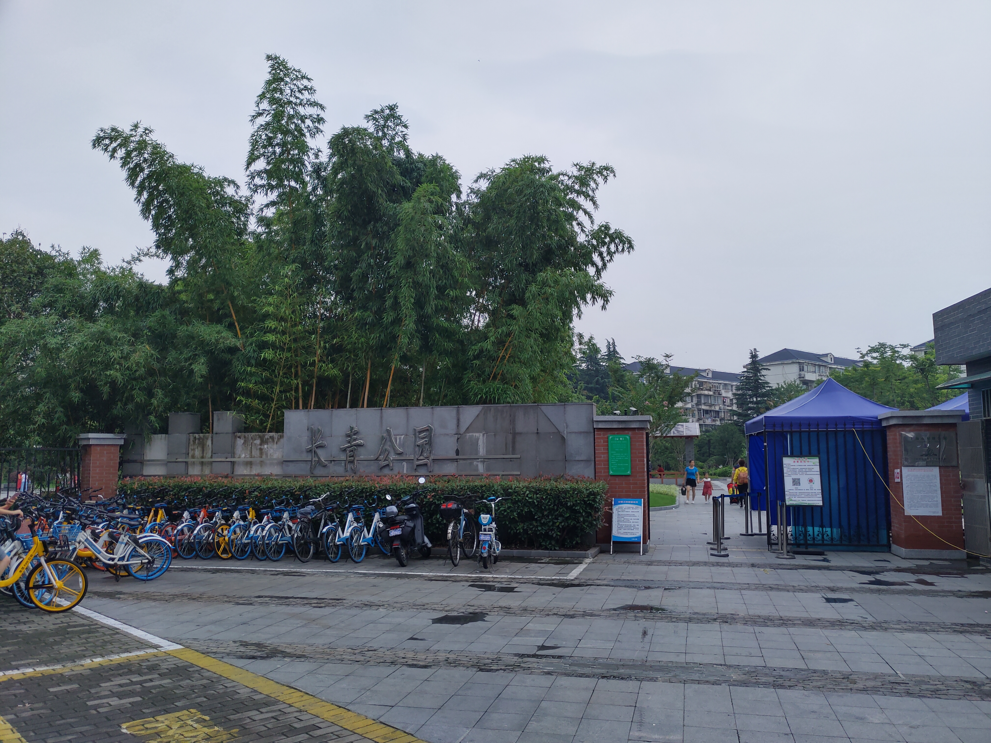 长青公园正门Changqing Park Shanghai Jun 2020